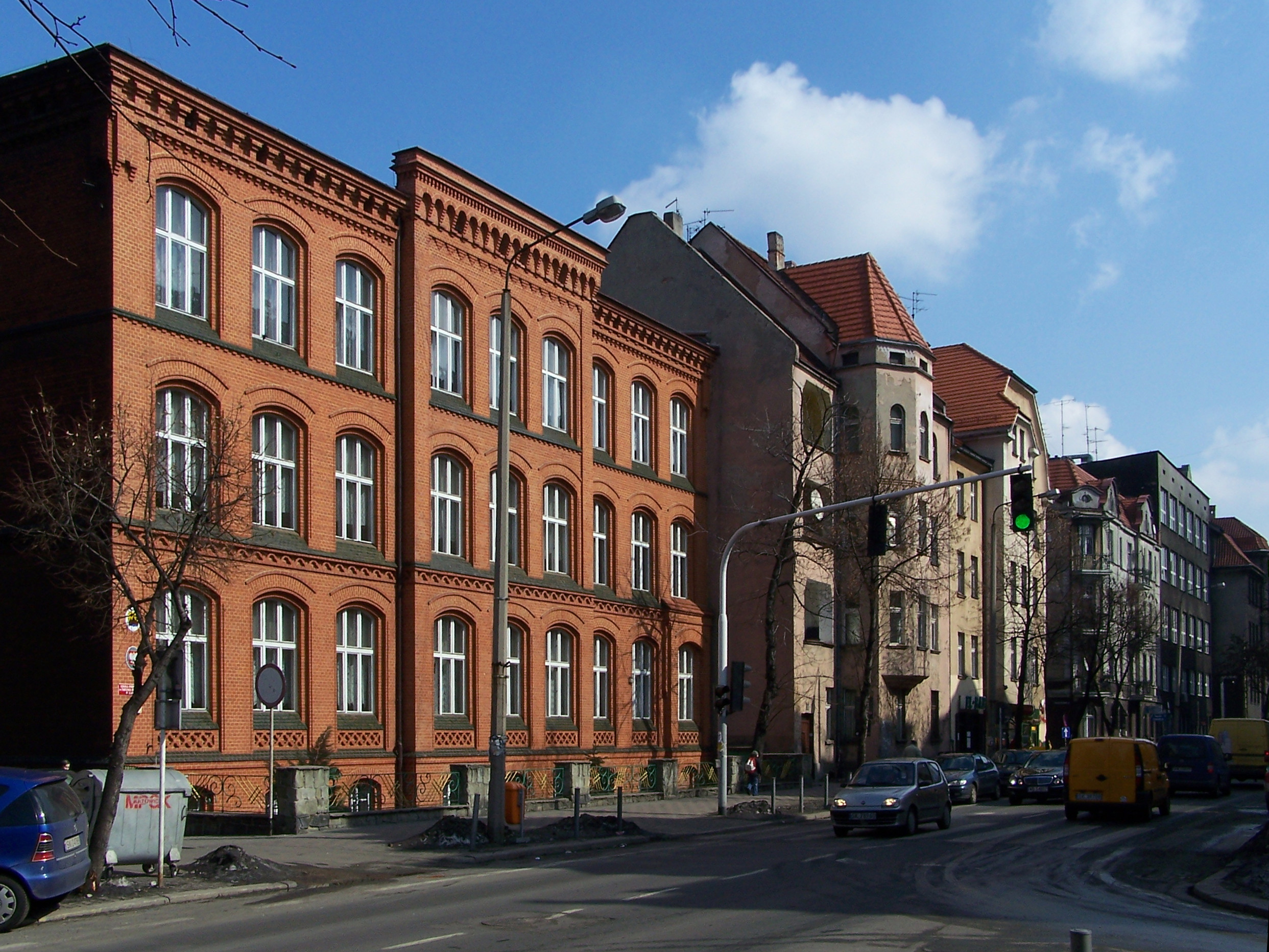 Szkoła Podstawowa nr. 1 przy ulicy Jagiellońskiej w Katowicach.